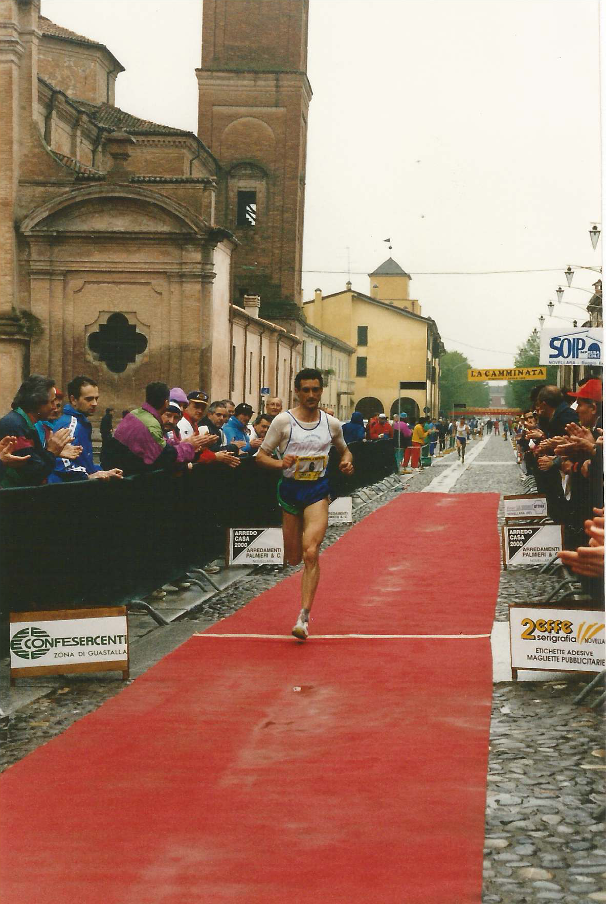 30km novellara